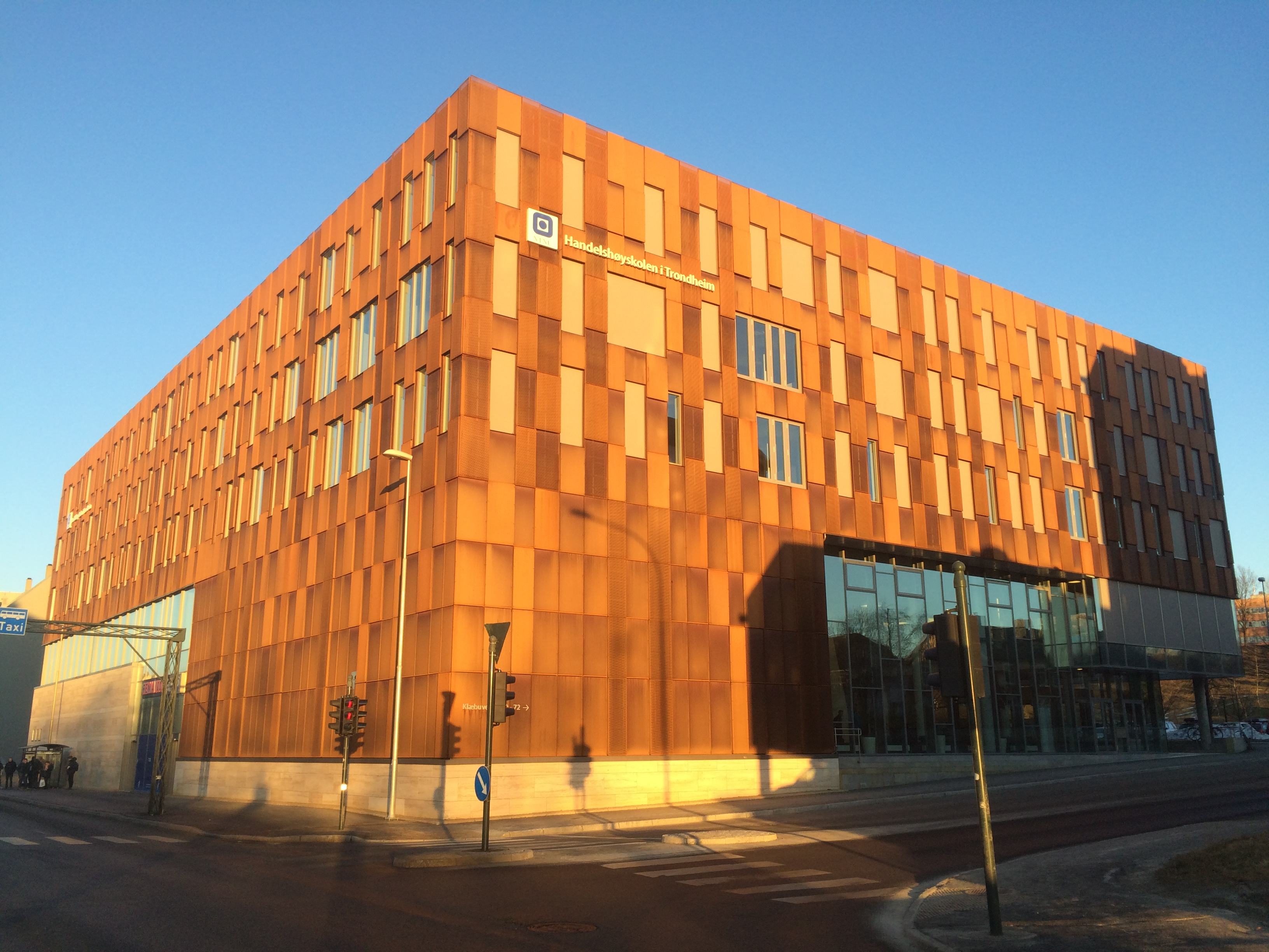 Handelshøyskolen i Trondheim sett fra sørvest. Arkitekt: Rambøll. Bygningen ble offisielt innviet i 2014